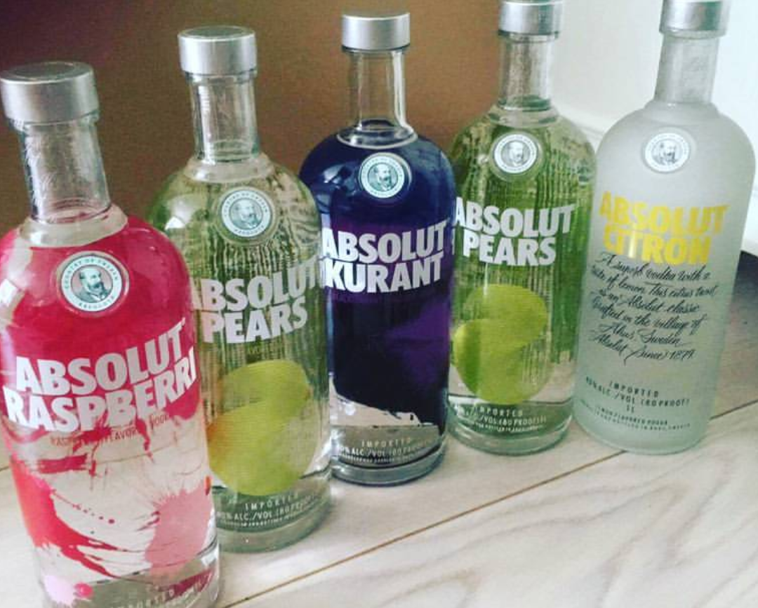 Mõned Absolut Vodka pudelid